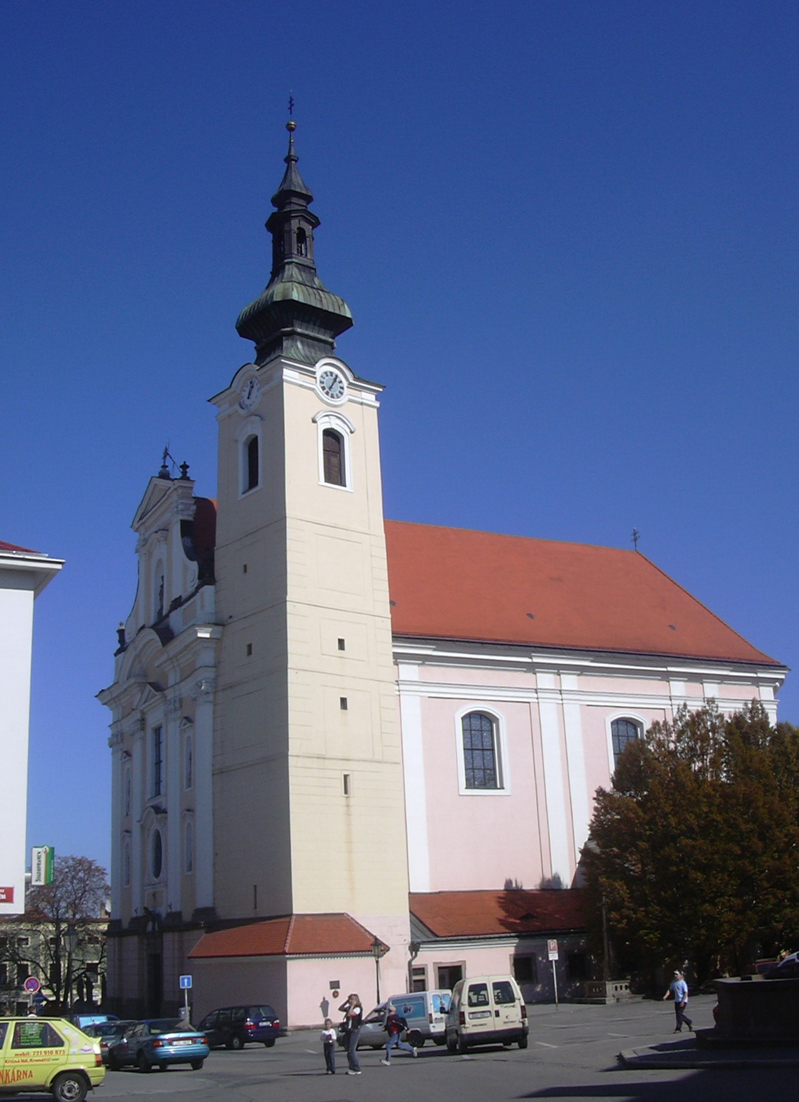 Nanebevzetí Panny Marie v Kroměříži